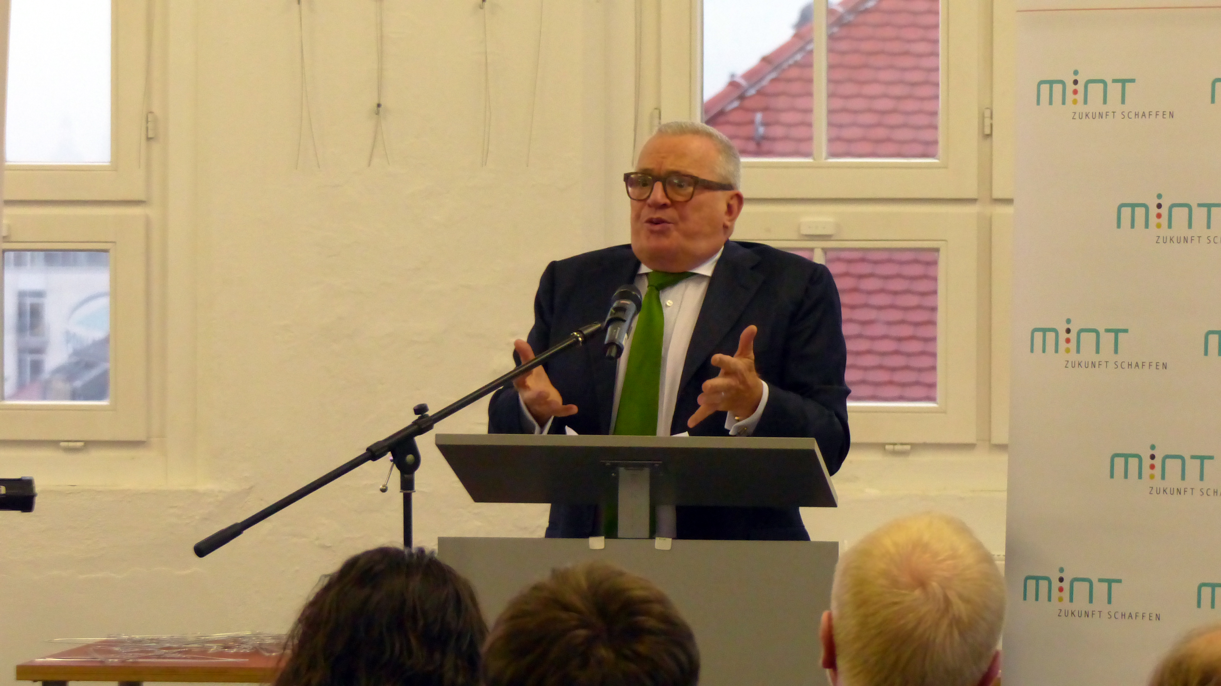 Preisverleihung im Rahmen der Wirtschaftsinitiative "MINT Zukunft schaffen" in Sachsen 2014 in den "Technischen Sammlungen Dresden" am 24.11.2014